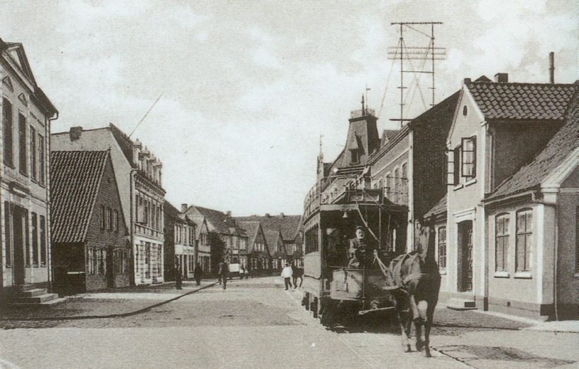 Foto der Uetersener Pferdebahn,aus der die Uetersener Eisenbahn entstand